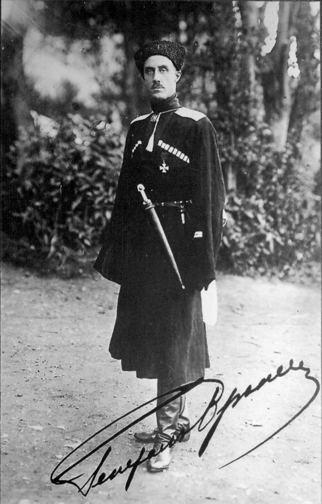 П.Н. Врангель